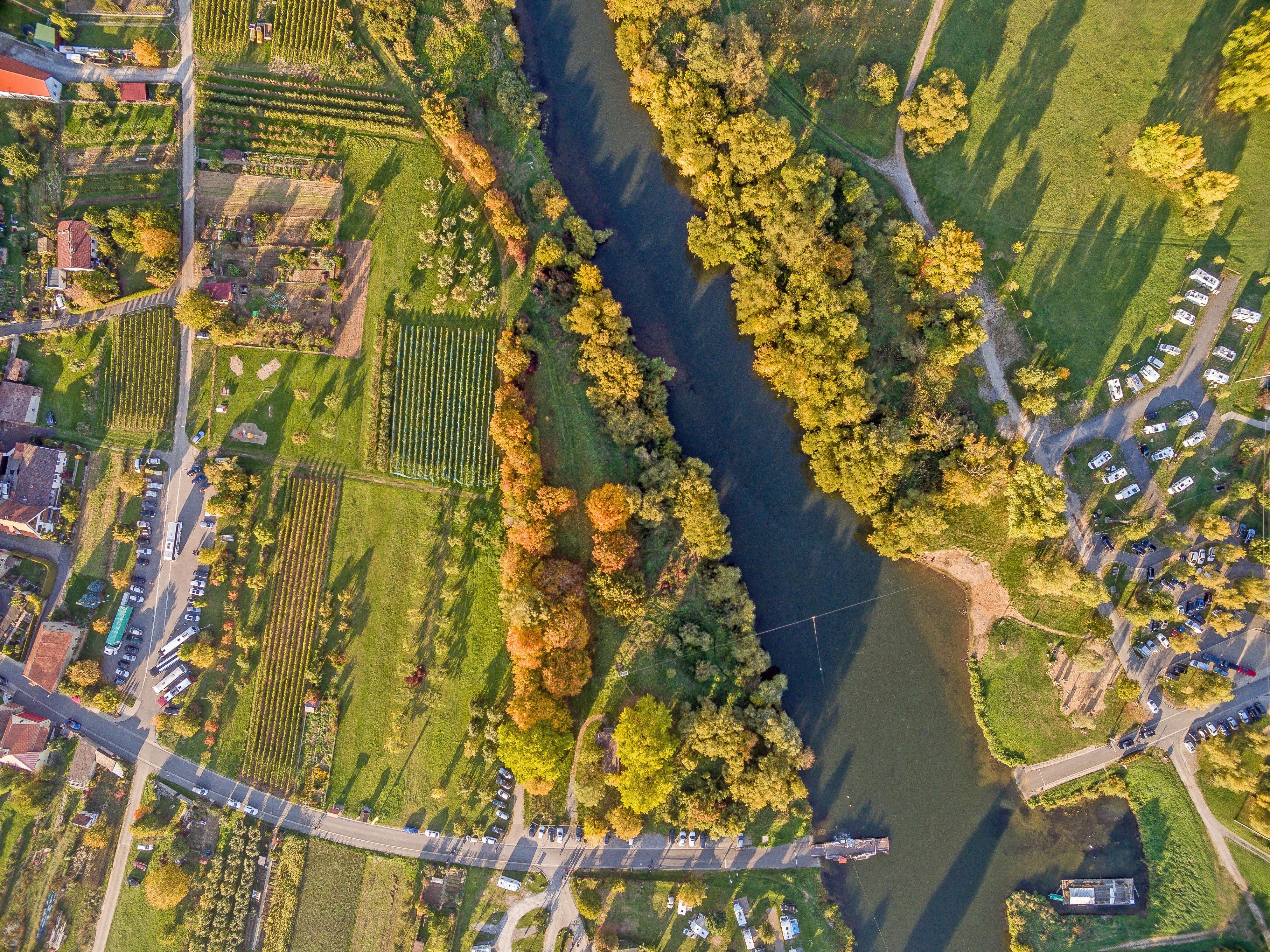 Luftaufnahme der Fähre zwischen Nordheim am Main und Escherndorf